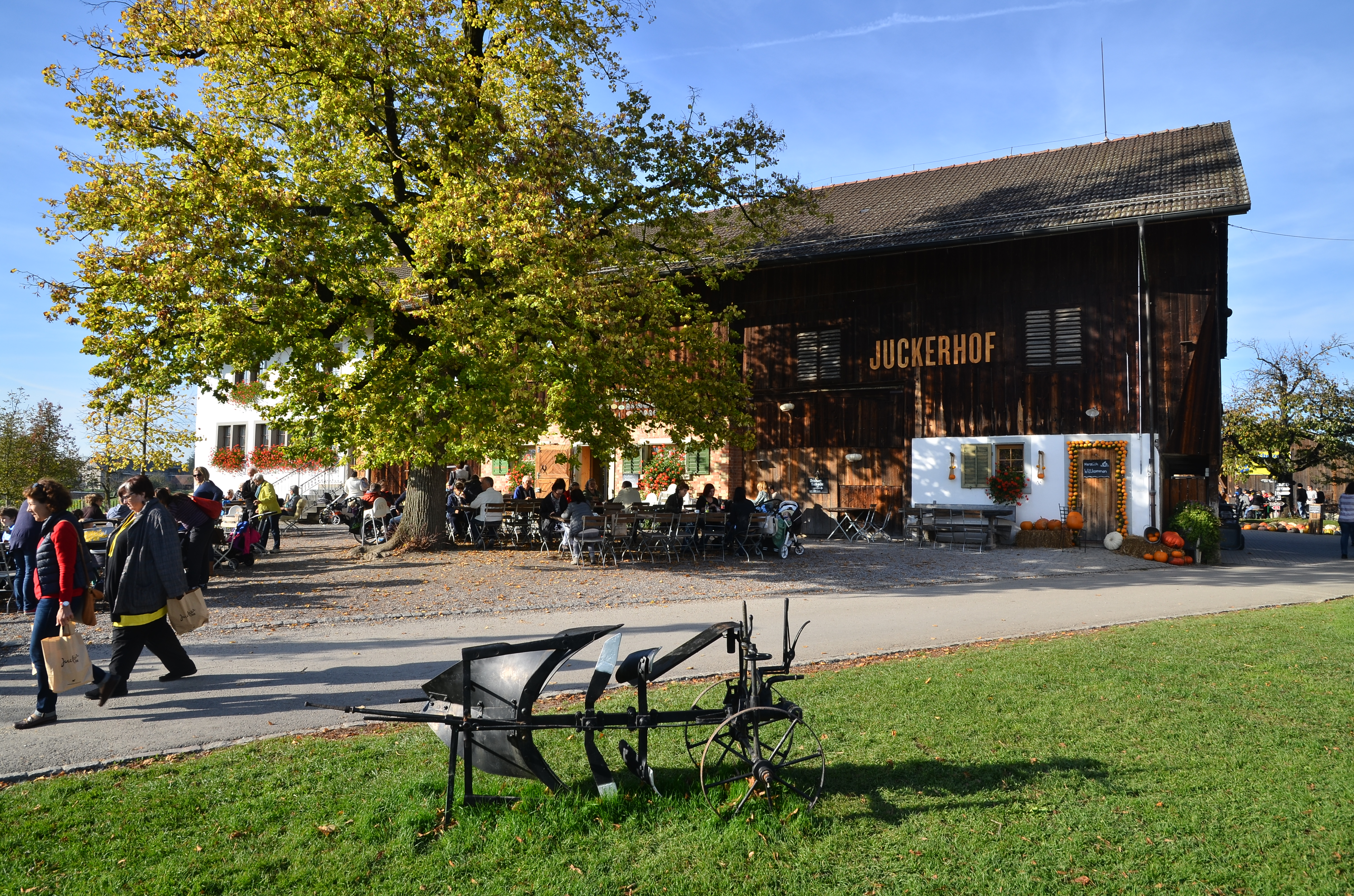 Kürbisausstellung (pumpkin festival), Jucker Farm (Juchhof) in Seegräben (Switzerland)